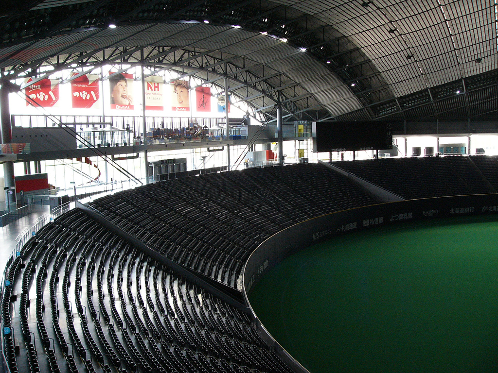 札幌ドーム屋内